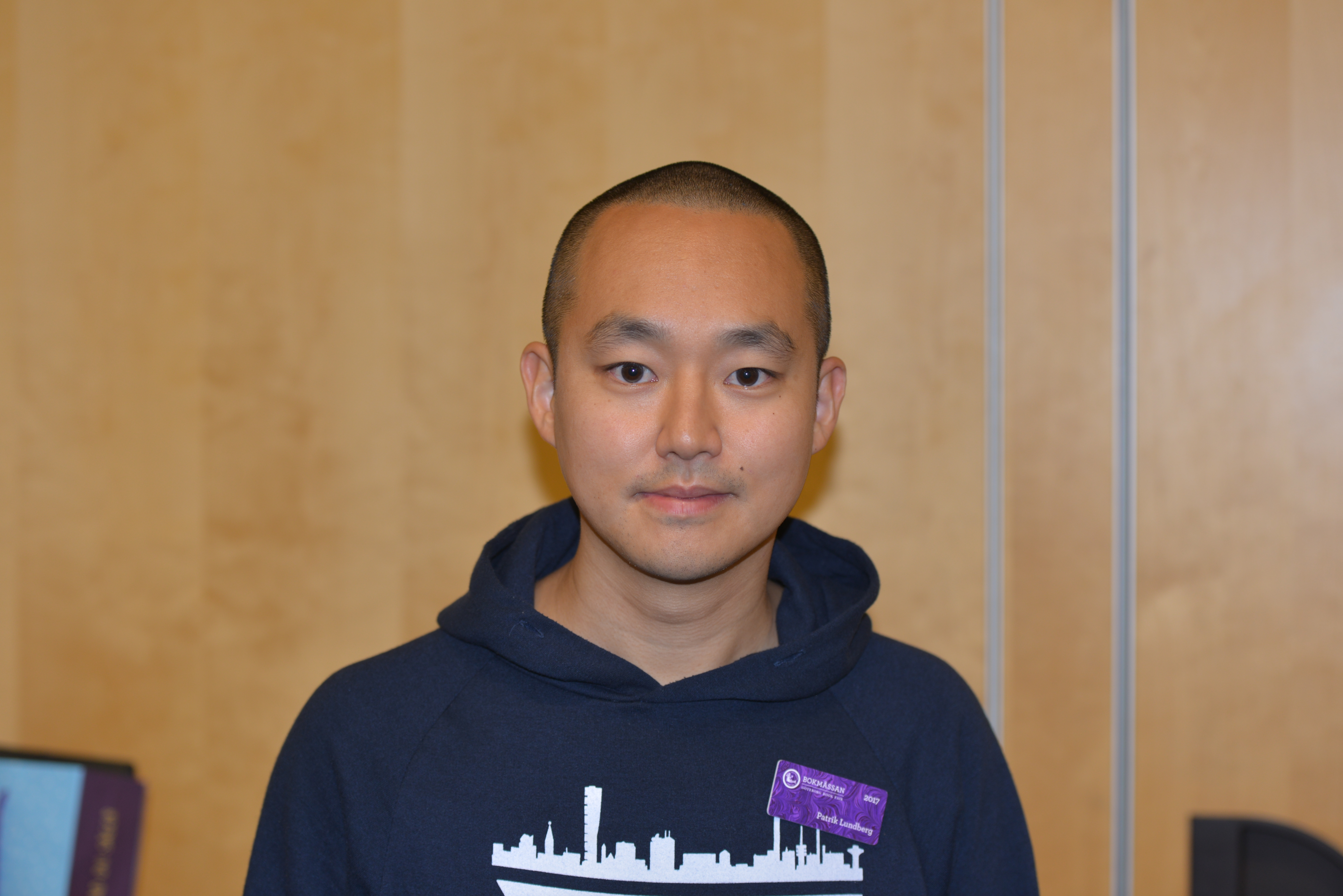 Patrik Lundberg vid en boksignering av hans senaste bok på Bokmässan i Göteborg 2017.